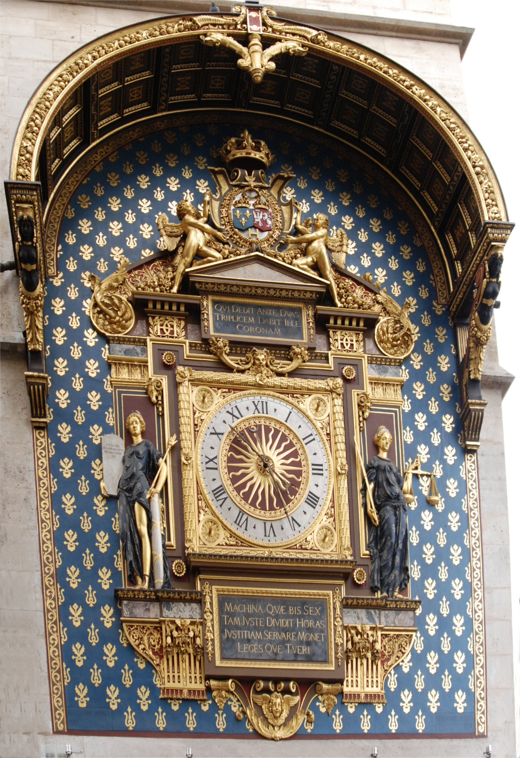 L'horloge de la Conciergerie au Palais de Justice de Paris .